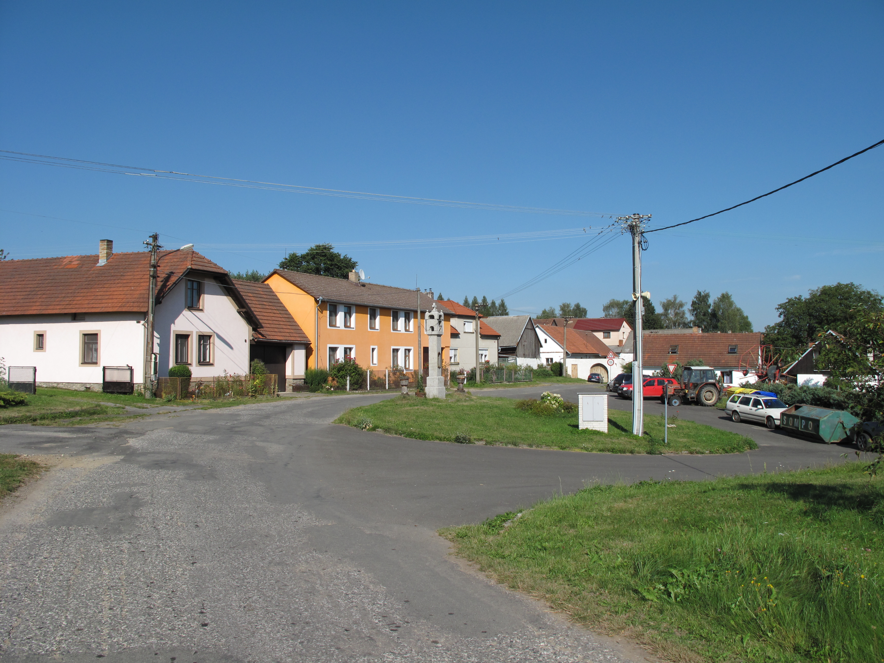 Stojslavice. Okres Tábor, Česká republika.